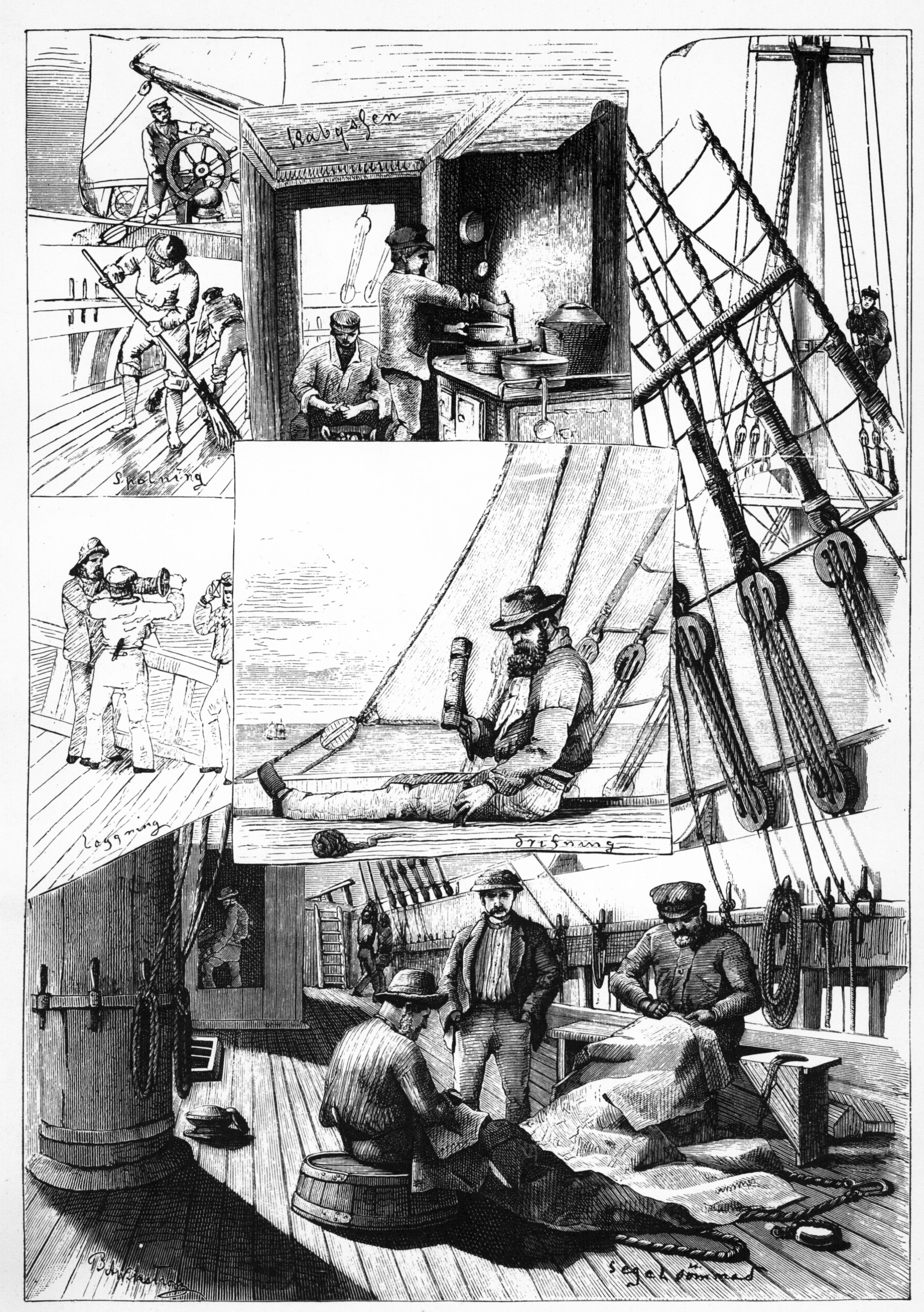 Dagligt liv på ett svenskt segelfartyg. Xylografi av Evald Hansen efter en teckning av B. A. Wikström i Ny illustrerad tidning 1882